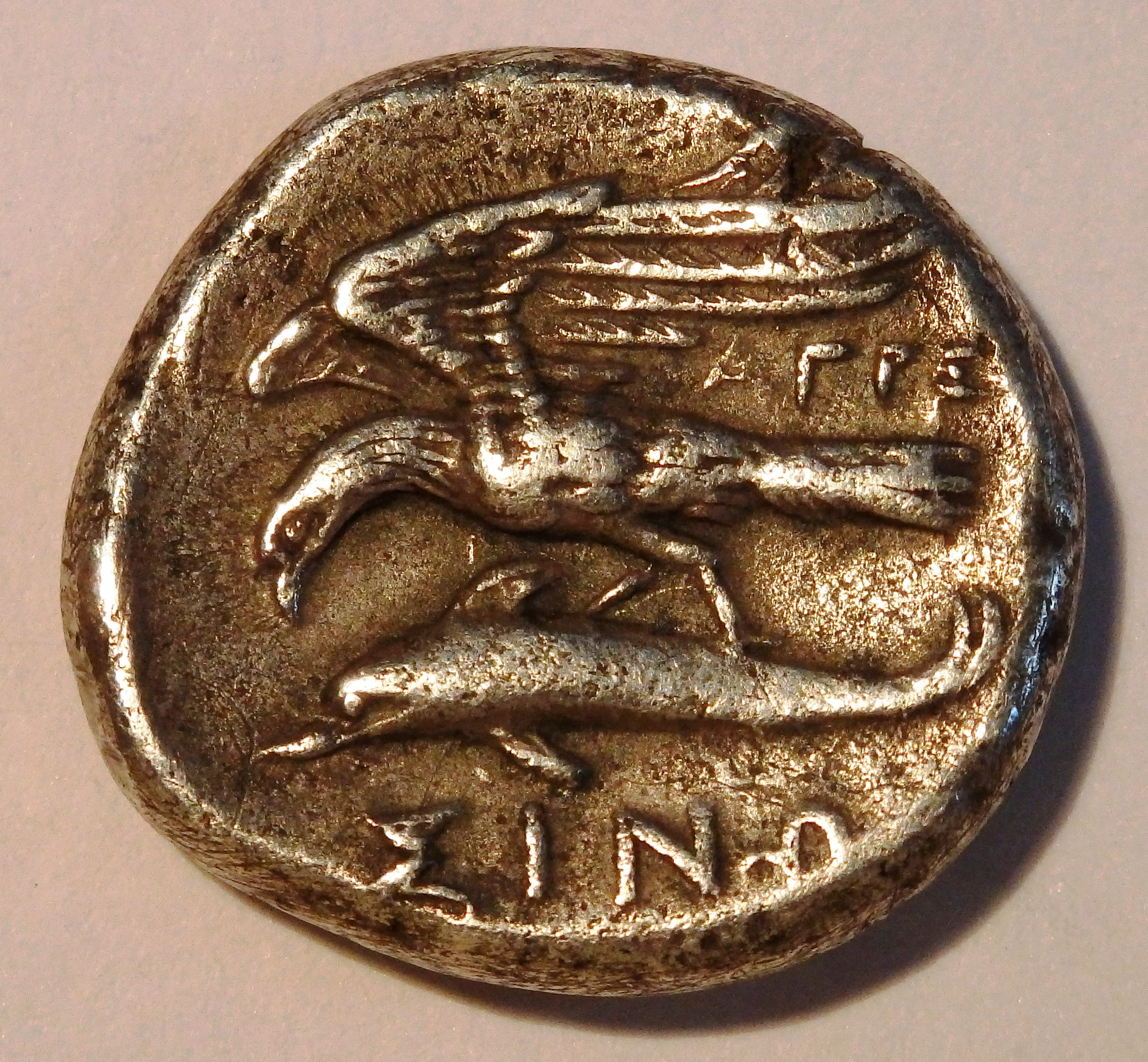 Drachme aus Sinope, Adler über Delphin, ca. 365-322 v. Chr. geprägt, Szaievert/Sear Nr. 3666